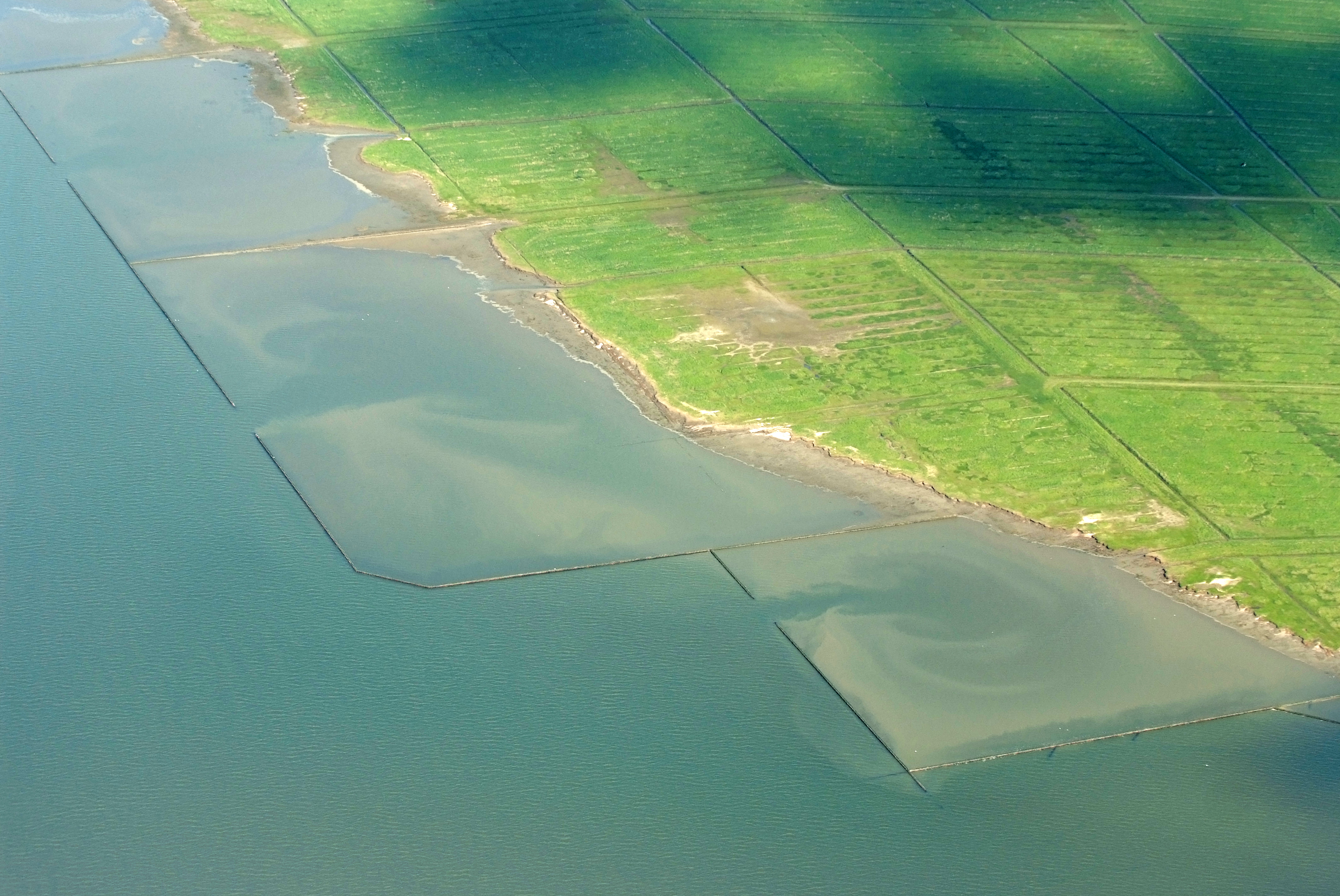 Fotoflug vom Flugplatz Nordholz-Spieka über Bremerhaven, Wilhelmshaven und die Ostfriesischen Inseln bis Borkum